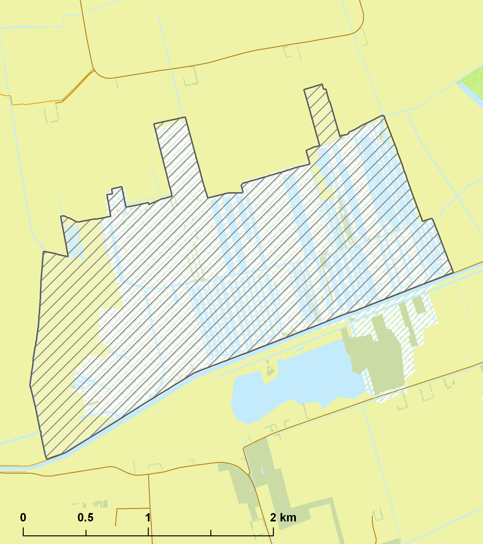 Natura2000 - Deelen.png